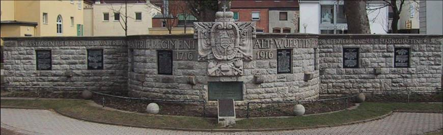 Denkmal für das Infanterie-Regiment „Alt-Württemberg (3. Württembergisches) Nr. 121 in Ludwigsburg